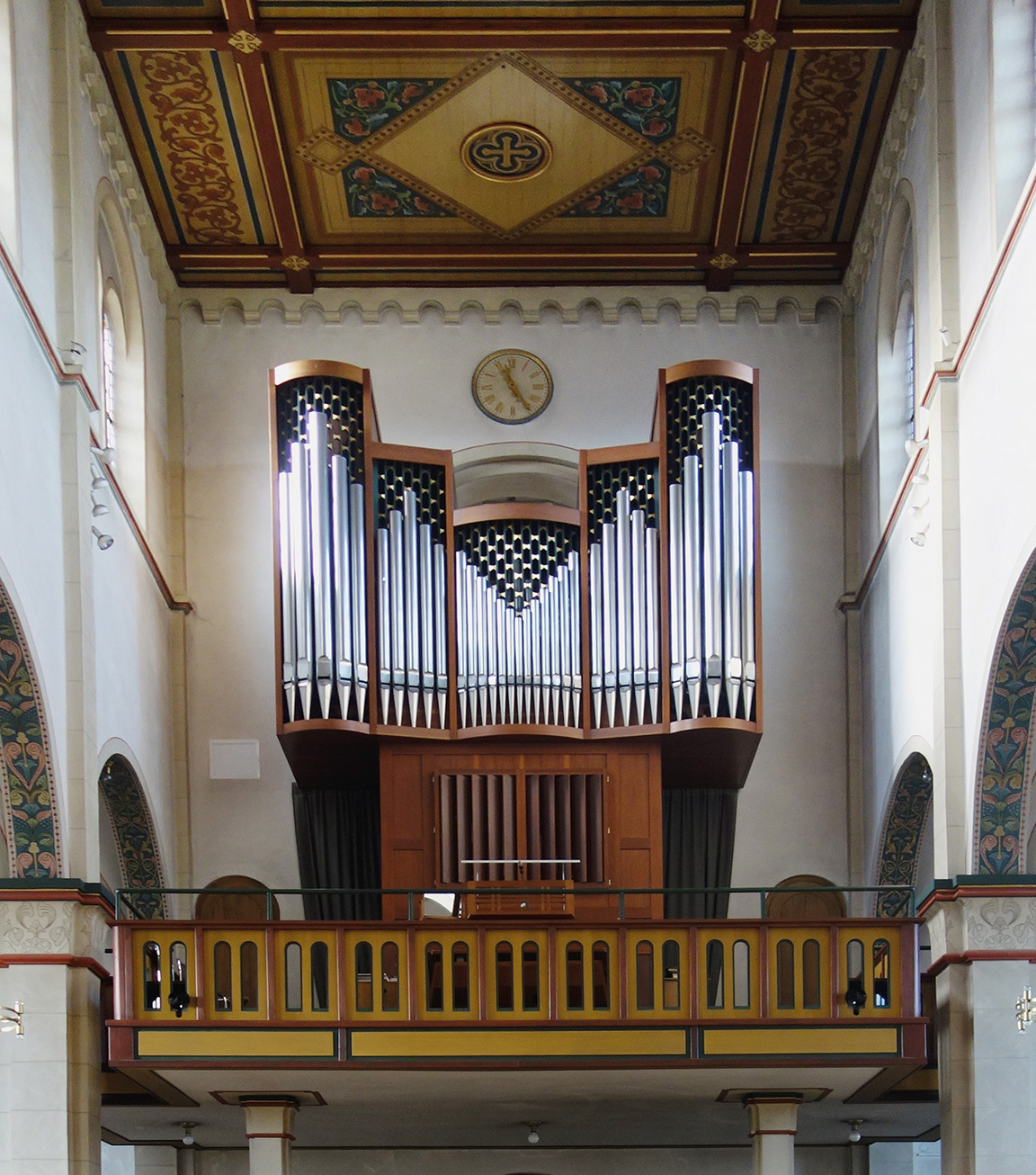 Orgel in der katholischen Pfarrkirche St. Maria-St. Vicelin, Neumünster, Stand 2016